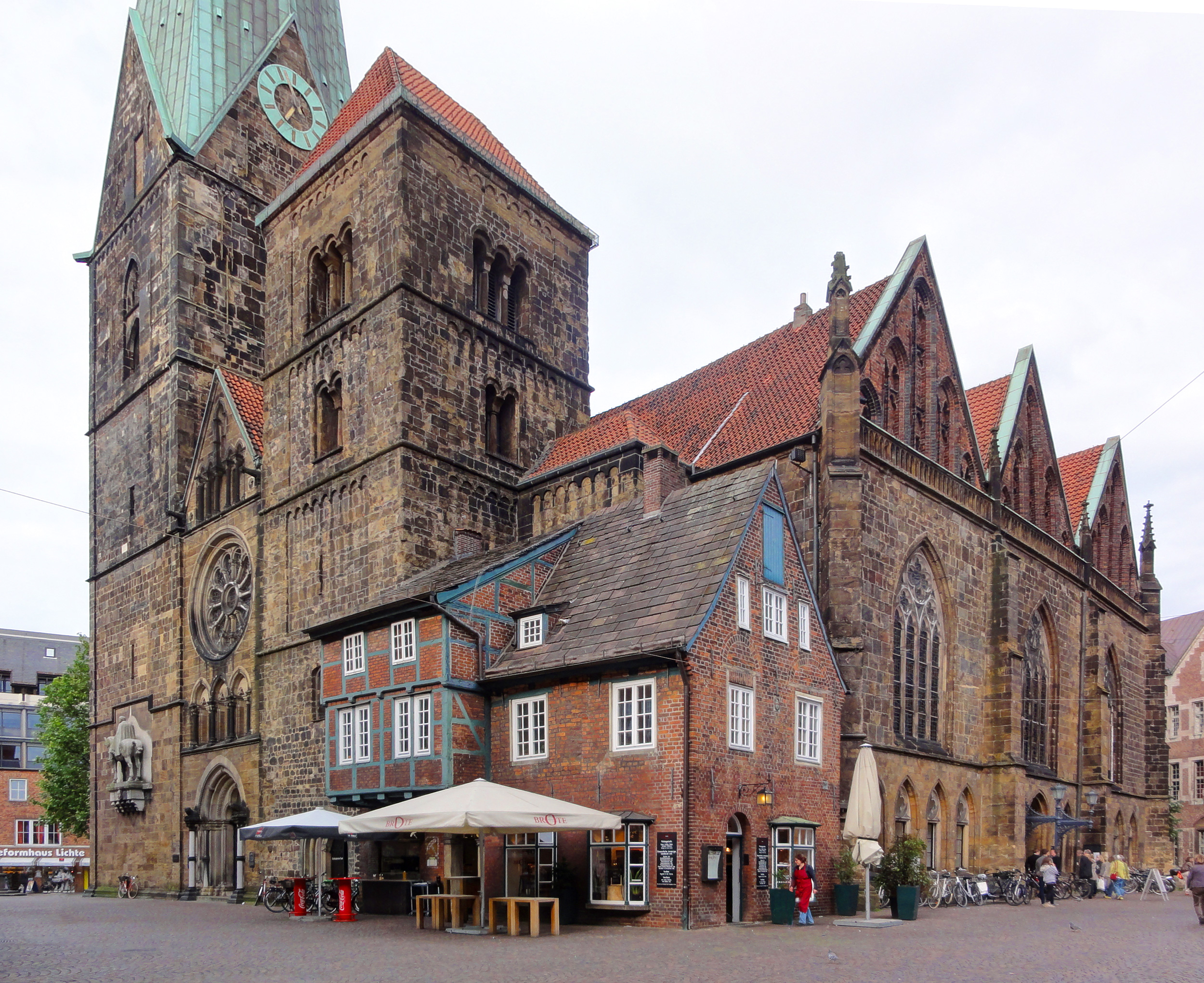 Organistenhaus in Bremen, Unser Lieben Frauen Kirchhof 27Das abgebildete Objekt ist ein geschütztes Kulturdenkmal in der Freien Hansestadt Bremen, mit der Nr. 1180,T002 beim Landesamt für Denkmalpflege registriert.